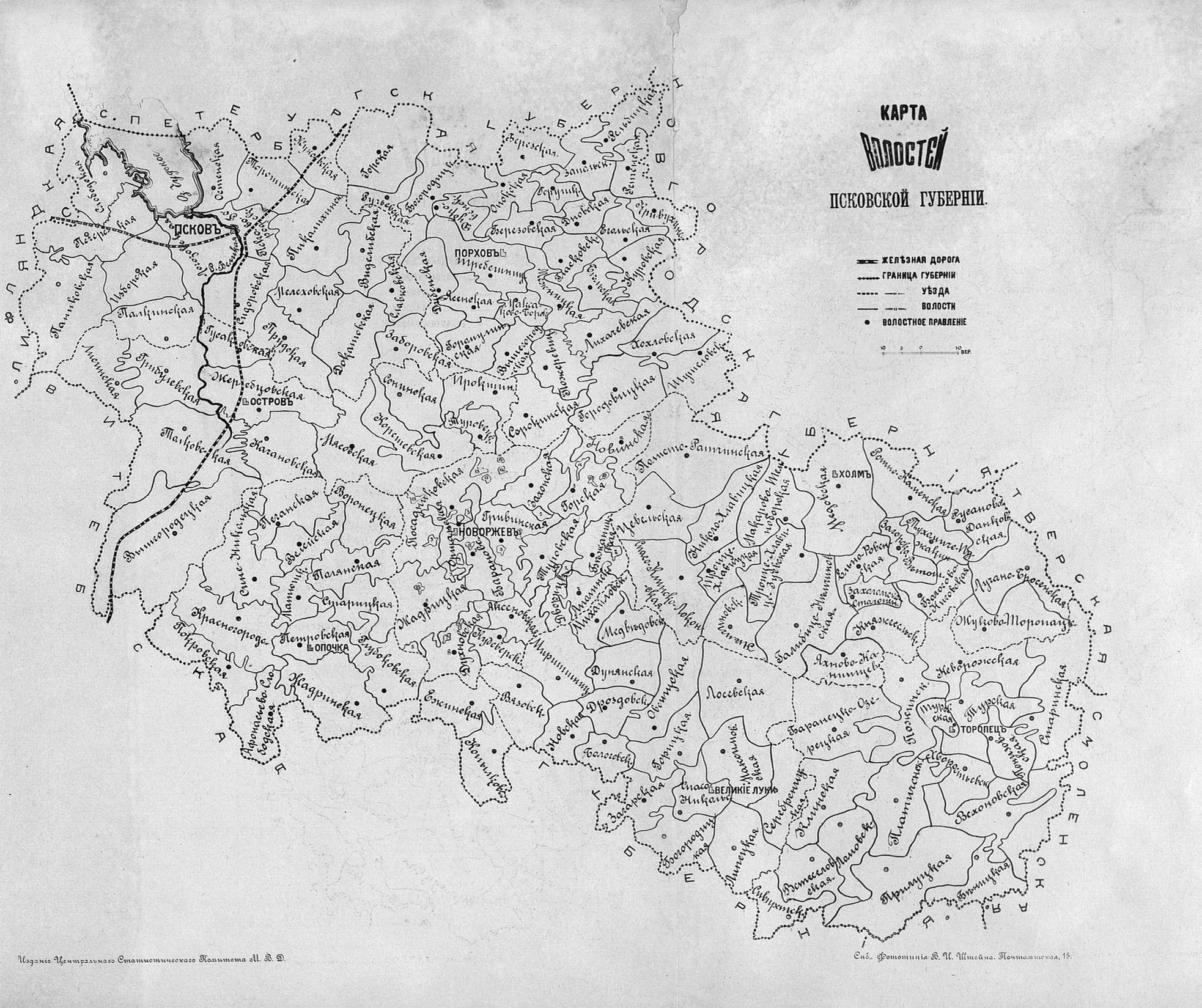 Карта волостей Псковской губернии